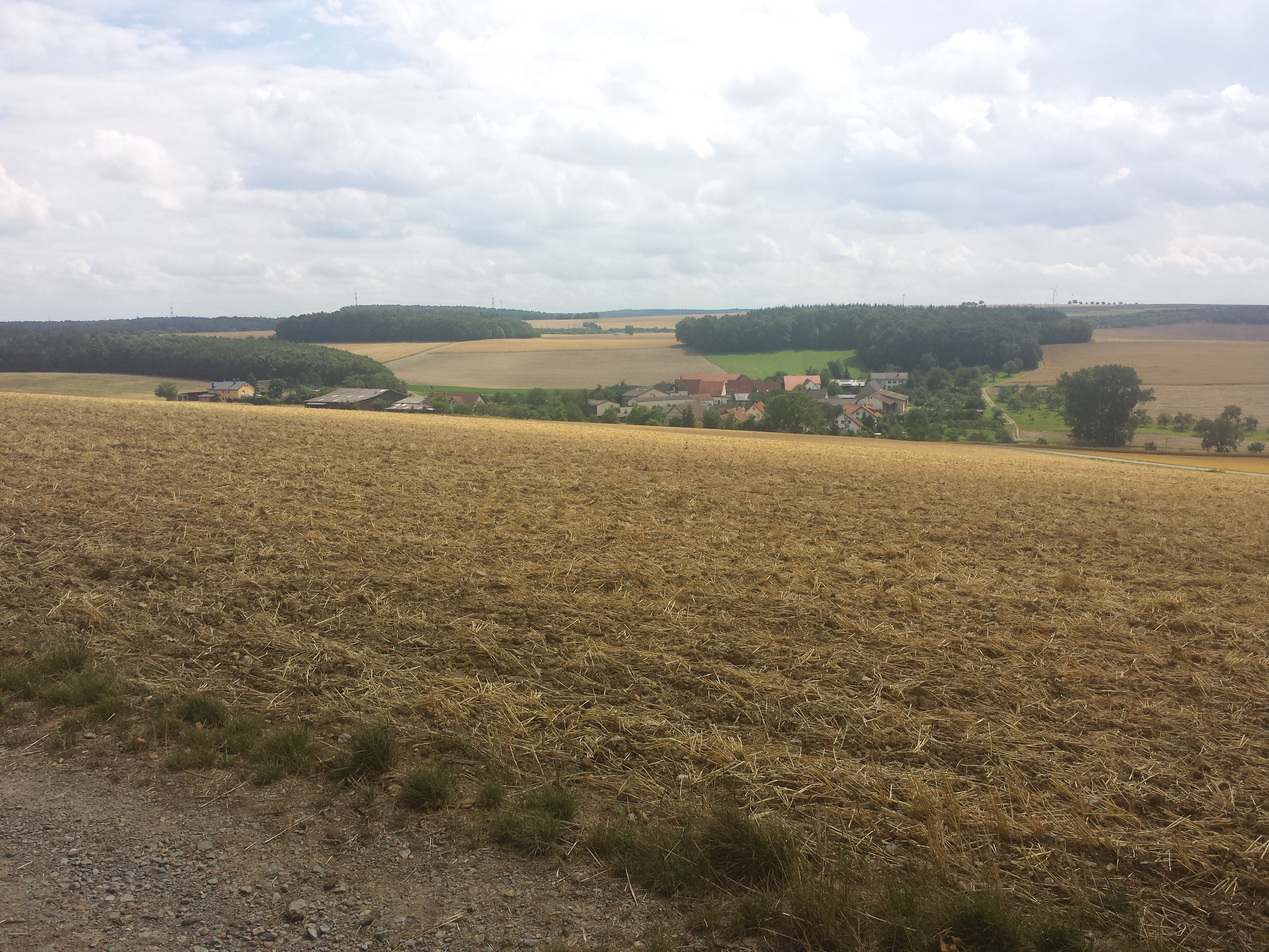 Zum Tauberbischofsheimer Stadtteil Dittigheim gehören das Dorf Dittigheim und der Weiler Hof Steinbach. Auf dem Bild ist Hof Steinbach zu sehen.